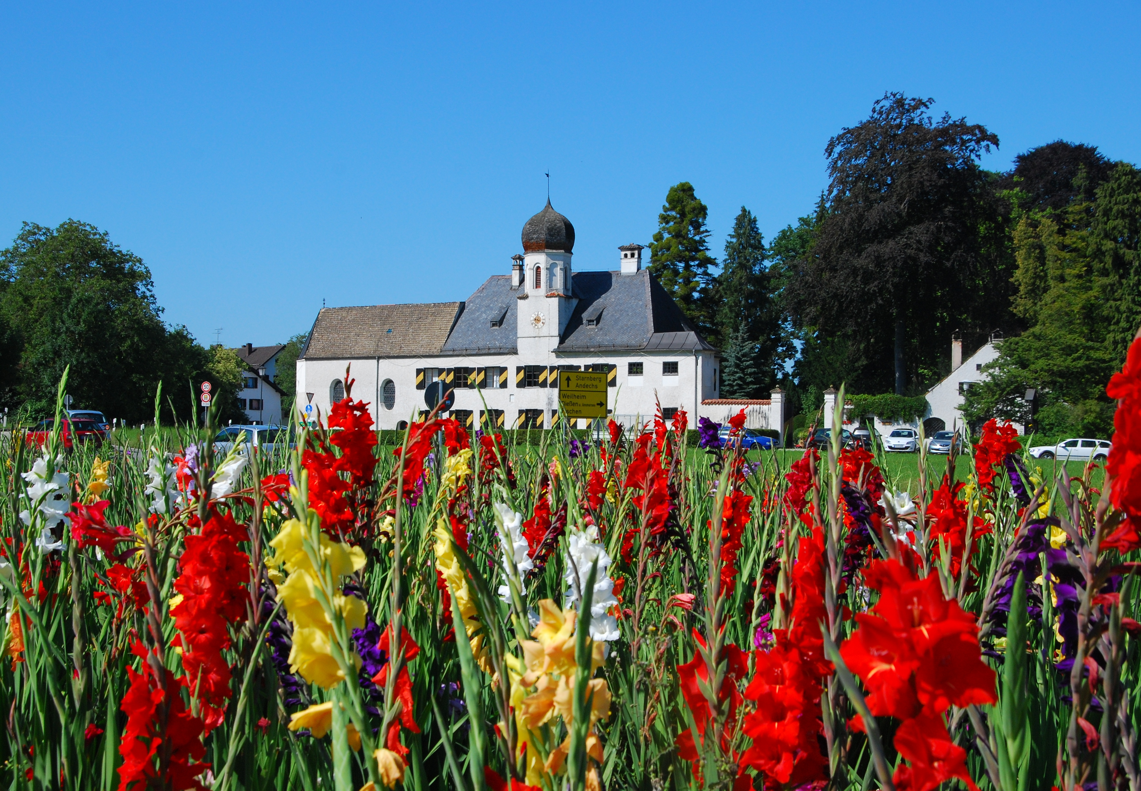 Herrsching, Schloss Mühlfeld. Der schlichte, zweigeschossige Walmdachbau mit Zwiebelturm wurde wahrscheinlich in der Mitte des 16. Jahrhunderts von Herzog Albrecht V. erbaut. Von 1597-1803 war das Schloss Teil der Andechser Klosterhofmark und diente zeitweilig den Mönchen des Klosters als Urlaubsdomizil.